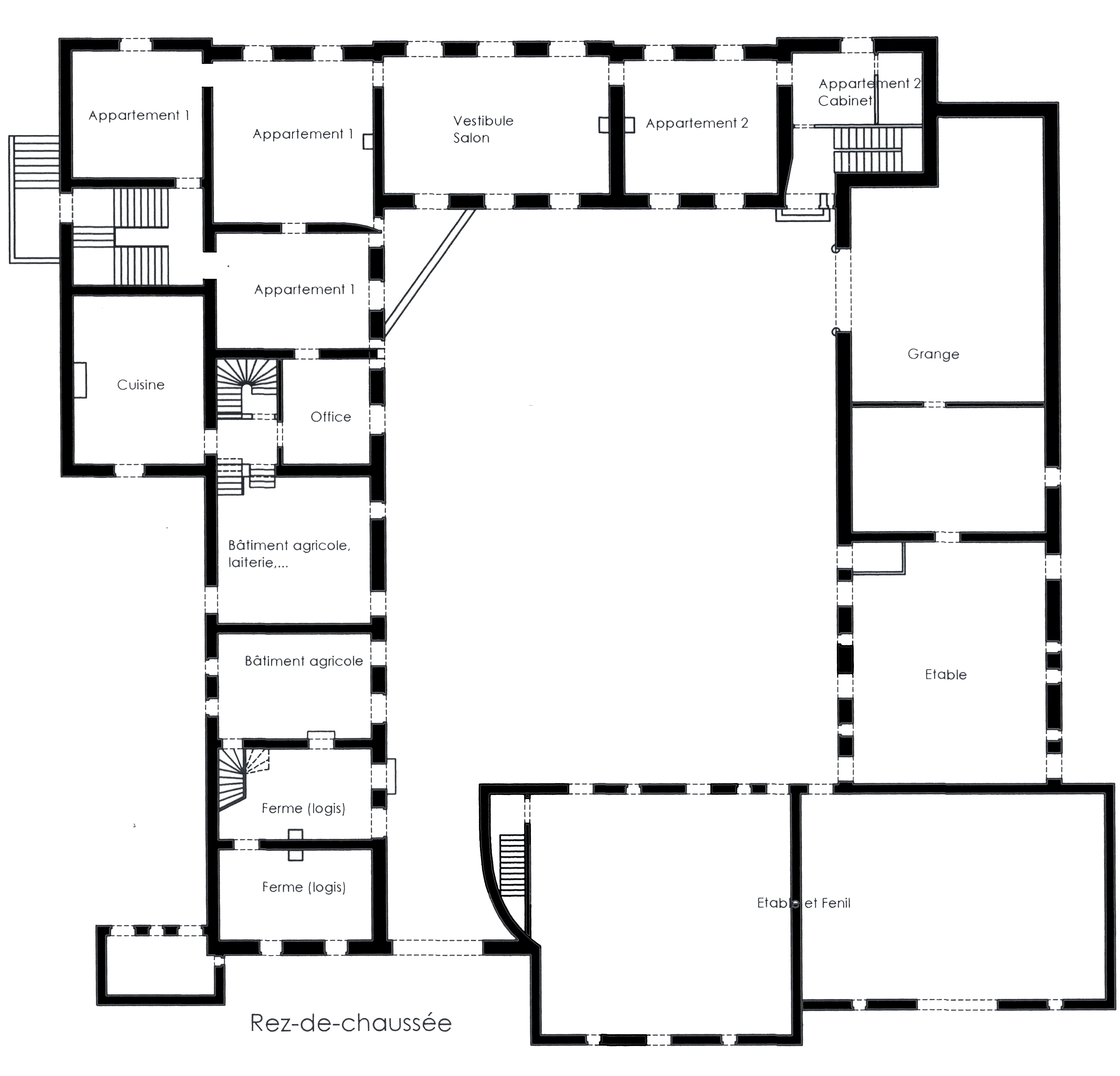 Plan du rez de chaussée du Chateau de Méan à Saive, état actuel